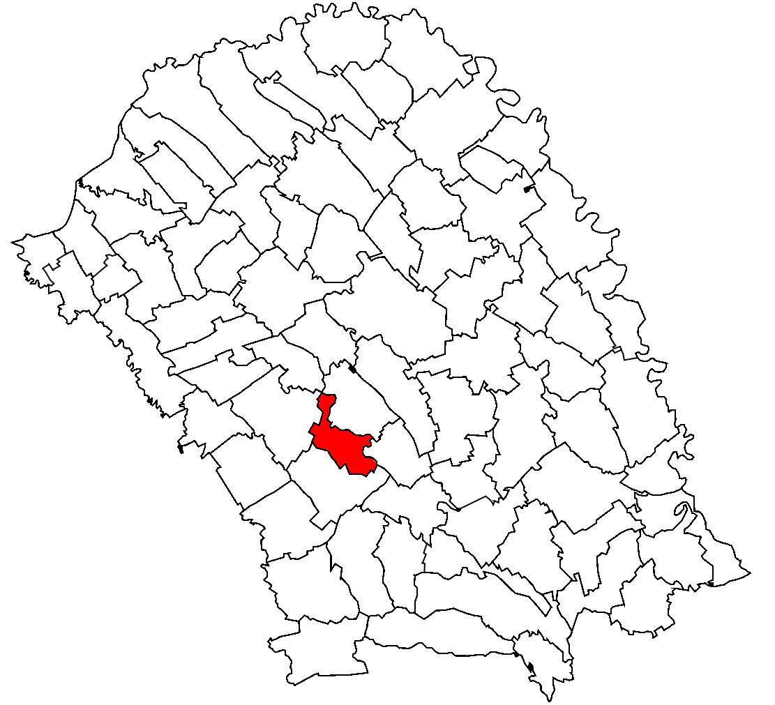 Categorie:Hărţi ale judeţului Botoşani